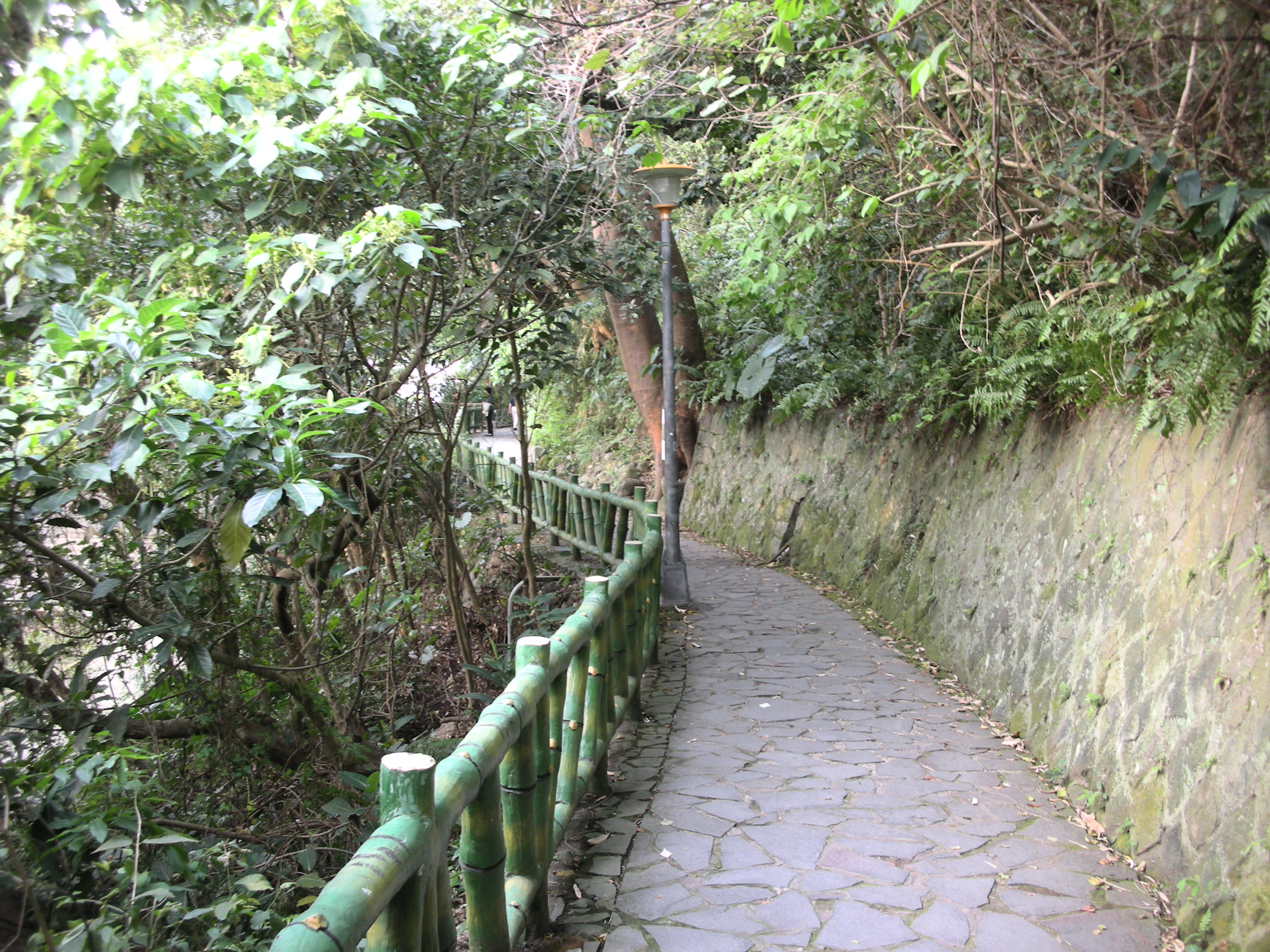 天母公園 Tianmu Park